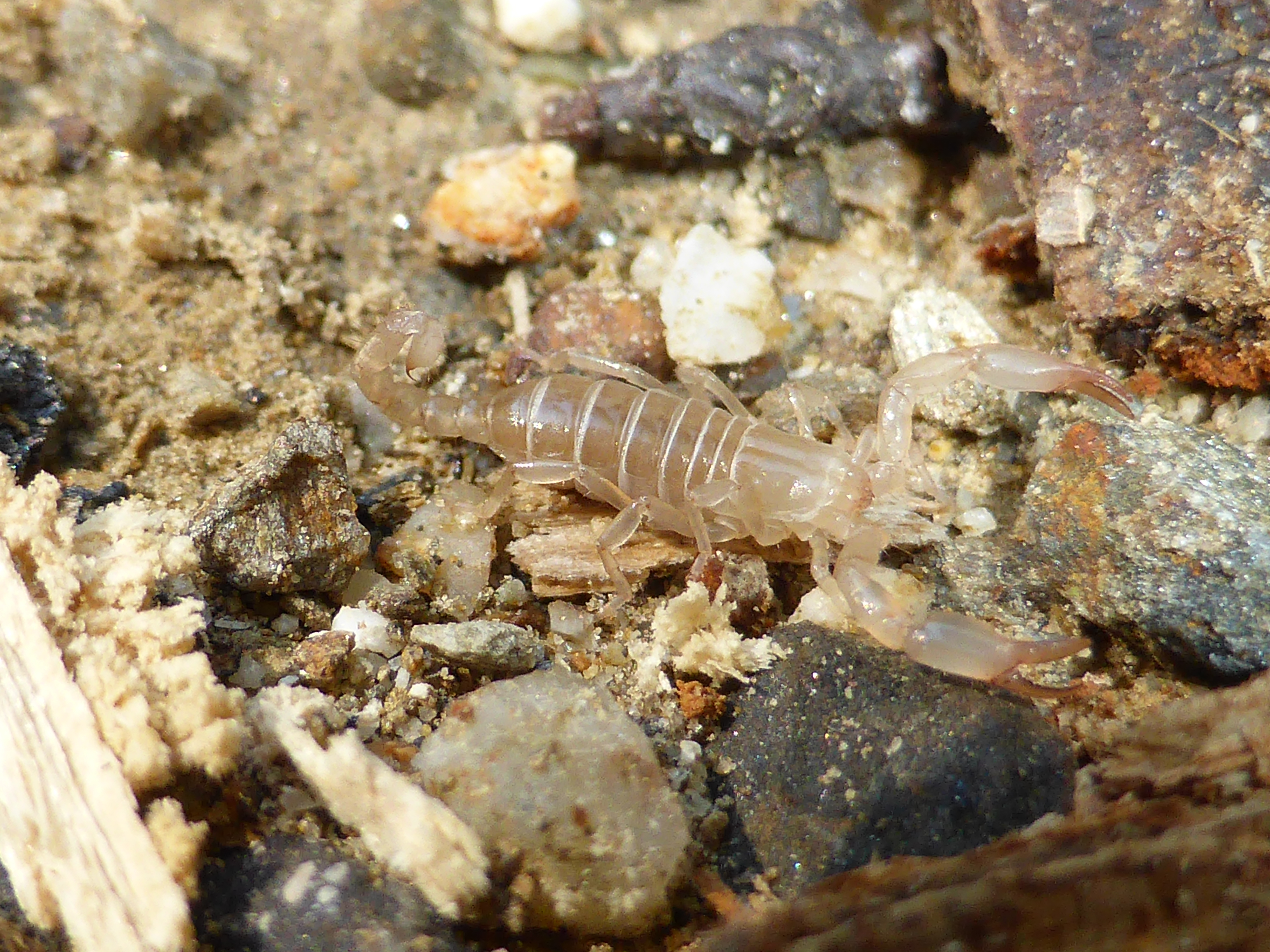 Young Belisarius xambeui